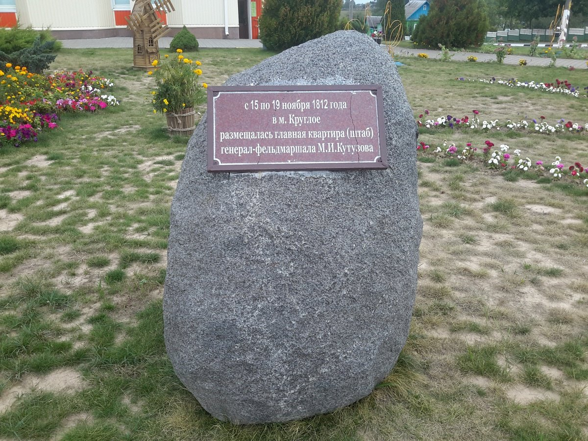 Круглае. Мемарыяльны камень